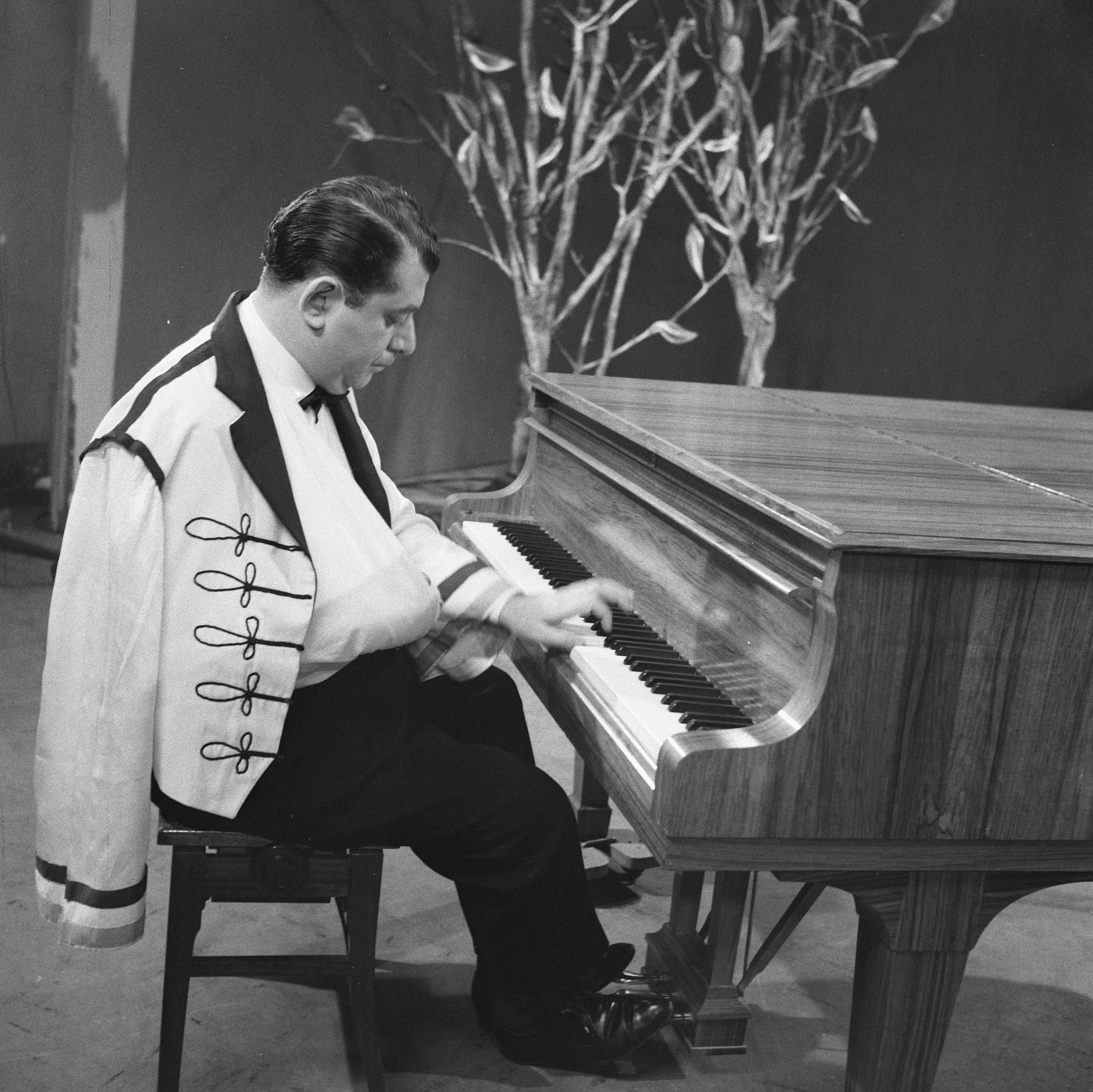 Collectie / Archief : Fotocollectie Anefo Reportage / Serie : [ onbekend ] Beschrijving : Repetitie voor programma "Marinade". Colea Serban aan piano Annotatie : Hij heeft rechterarm in het gips Datum : 21 april 1961 Trefwoorden : musici, televisieprogramma's Persoonsnaam : Serban, Colea Fotograaf : Nijs, Jac. de / Anefo Auteursrechthebbende : Nationaal Archief Materiaalsoort : Negatief (zwart/wit) Nummer archiefinventaris : bekijk toegang 2.24.01.03 Bestanddeelnummer : 912-3862